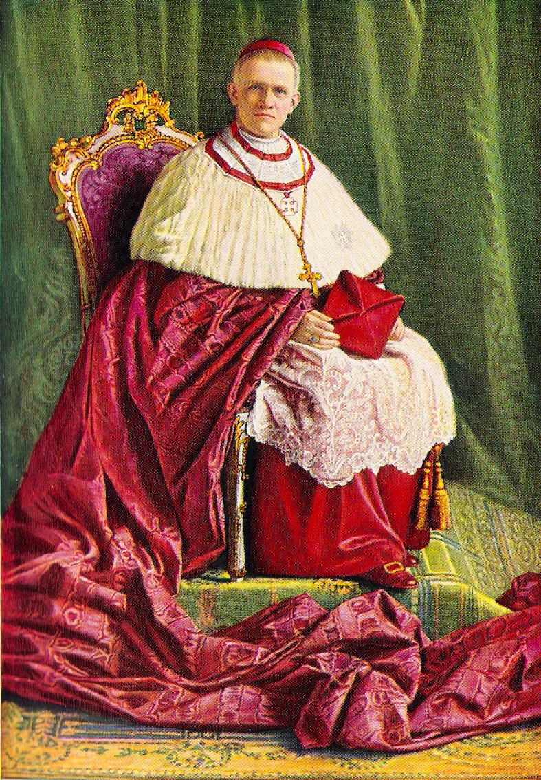 Theodor Kardinal Innitzer – * 1875-12-25 (Nové Zvolání u Vejprt, CZ), † 1955-10-09 (Wien, AT)